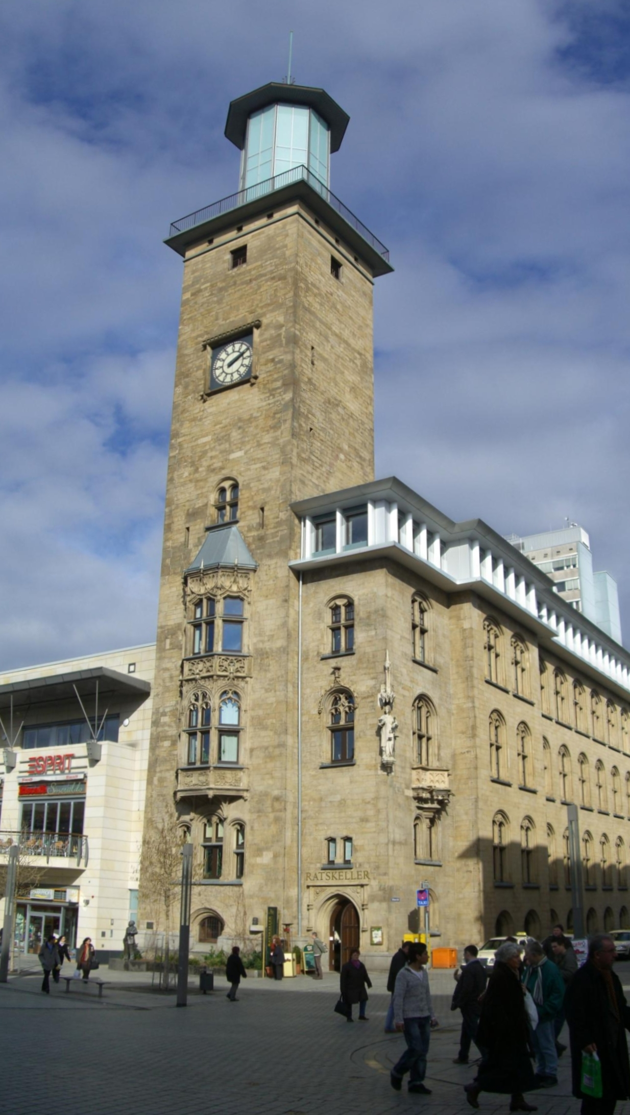 Rathausturm in Hagen